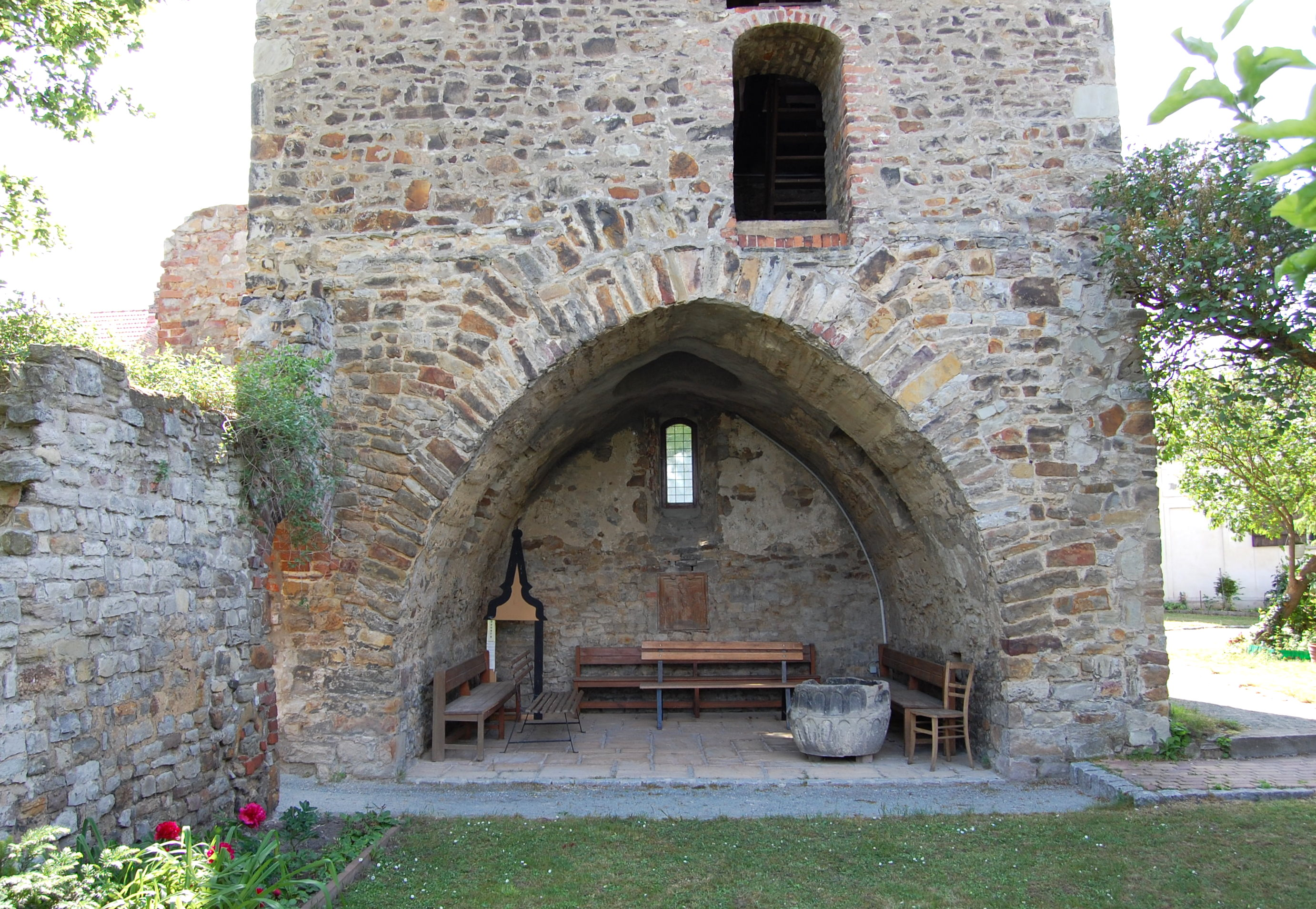 Blick aus Richtung des ehemaligen Kirchenschiffs in das Turmgewölbe der Sankt-Stephanus-Kirche Magdeburg-Westerhüsen